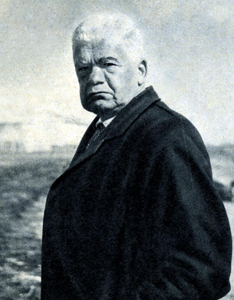 Alessandro De Stefani